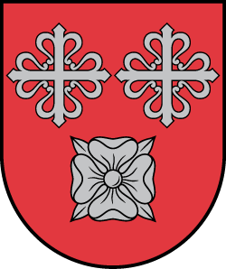 Kategorija:Raunas novads Kategorija:Latvijas novadu ģerboņi